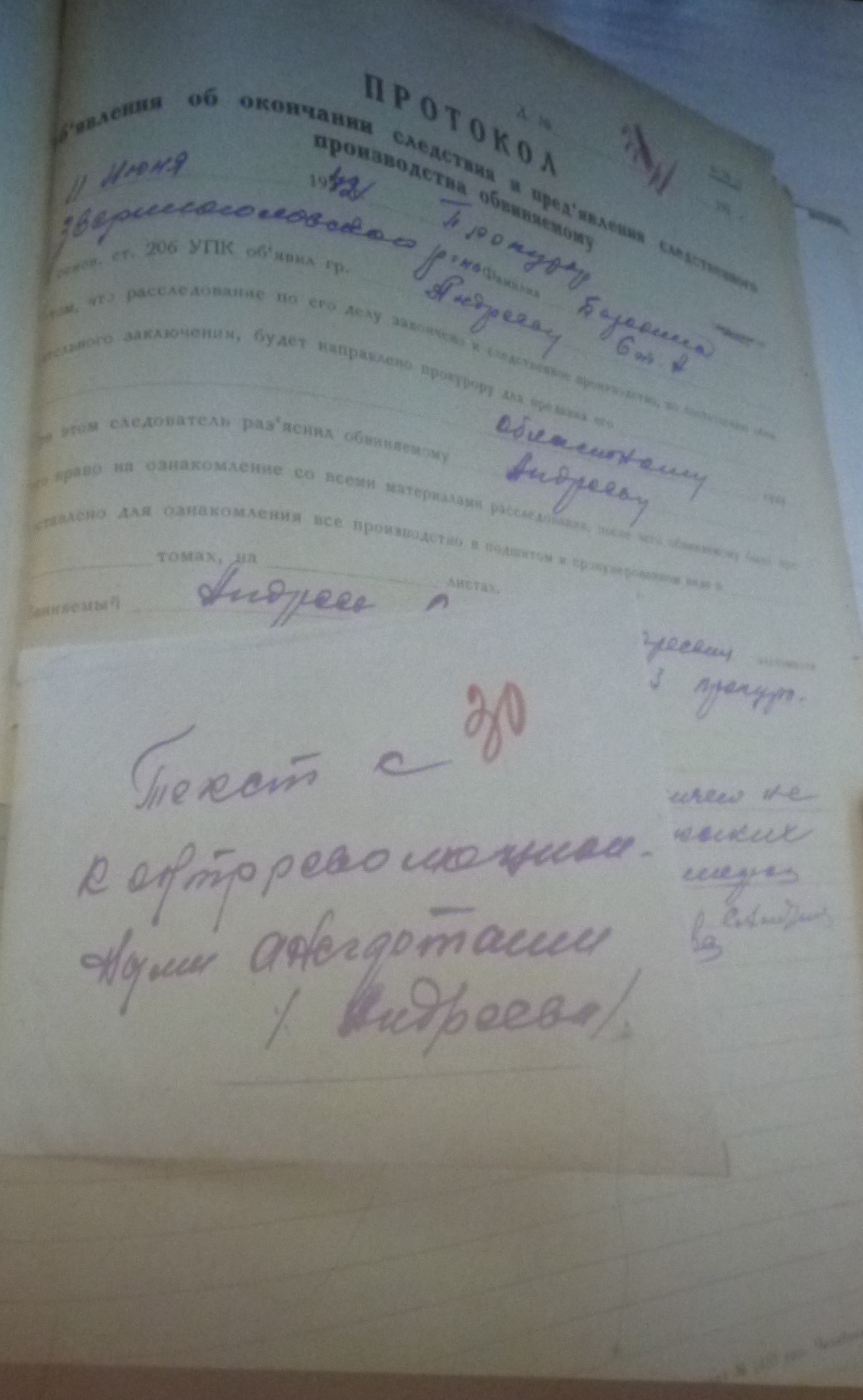 Пакет с контрреволюционным анекдотом о Сталине и Троцком из дела обвиняемого Андреева 1942 год Челябинский областной суд